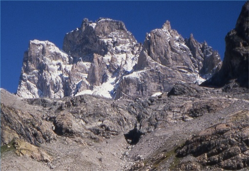 Pic Sans Nom